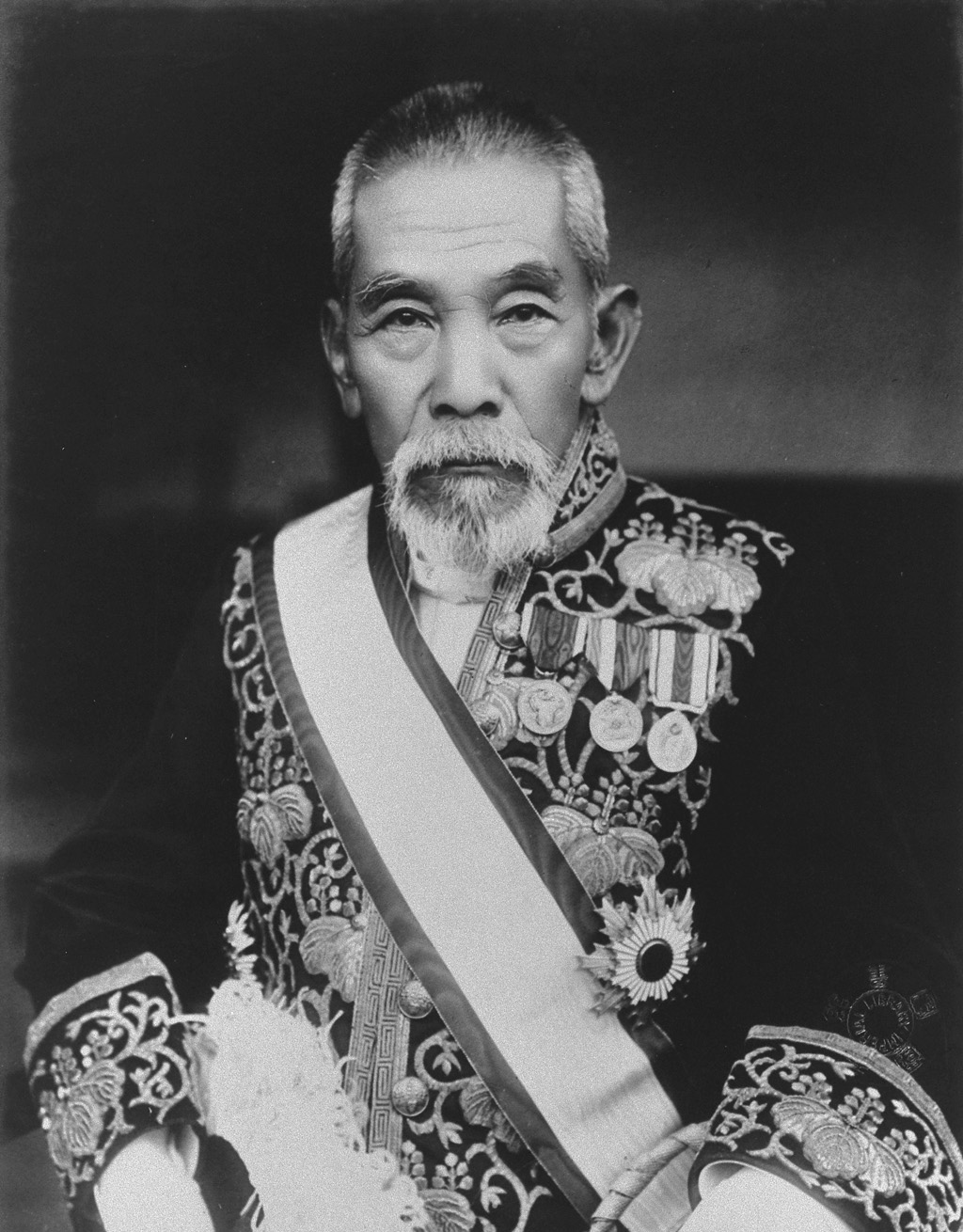 Portrait of Inukai Tsuyoshi (犬養毅, 1855 – 1932)